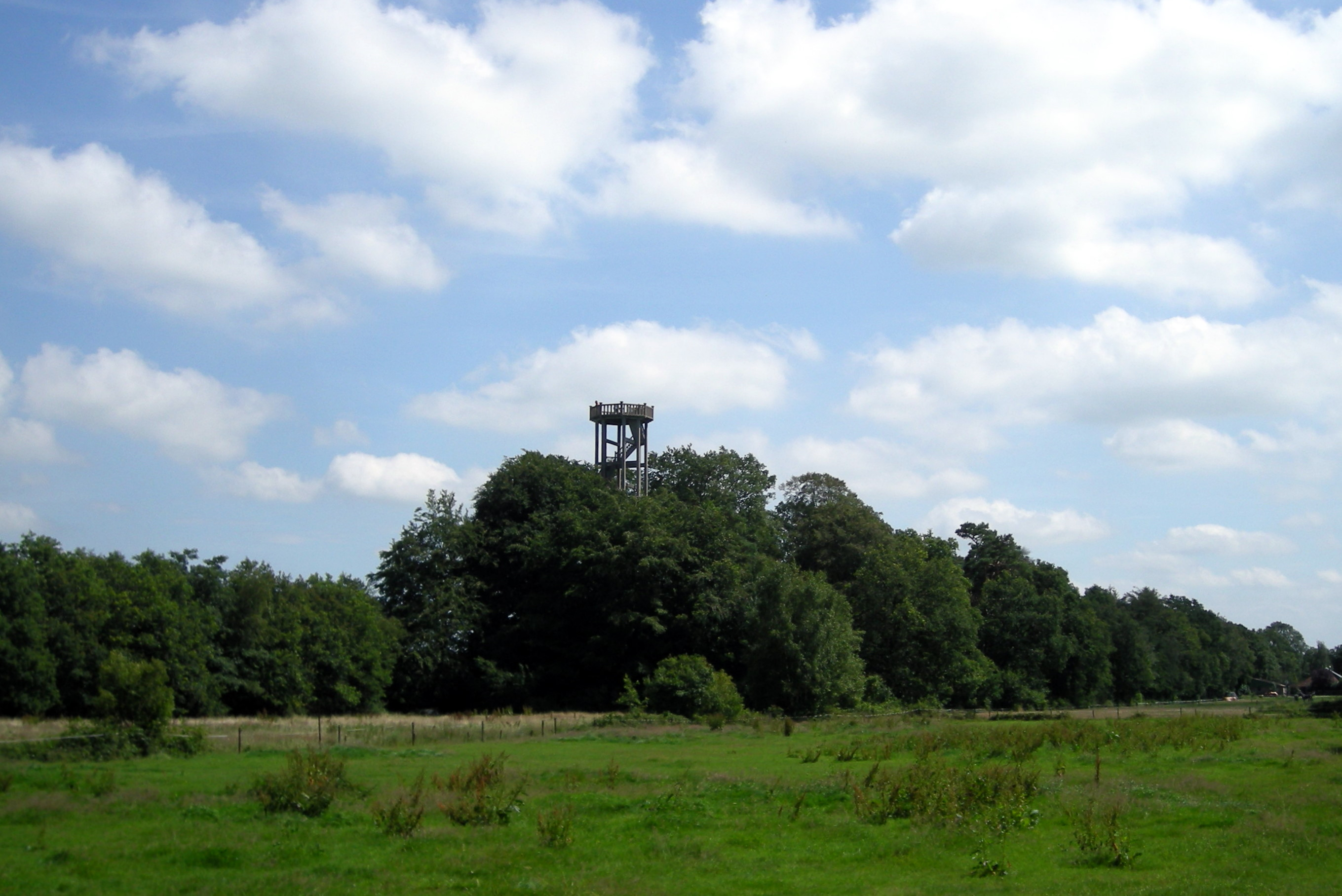 Belvedere Oranjewoud